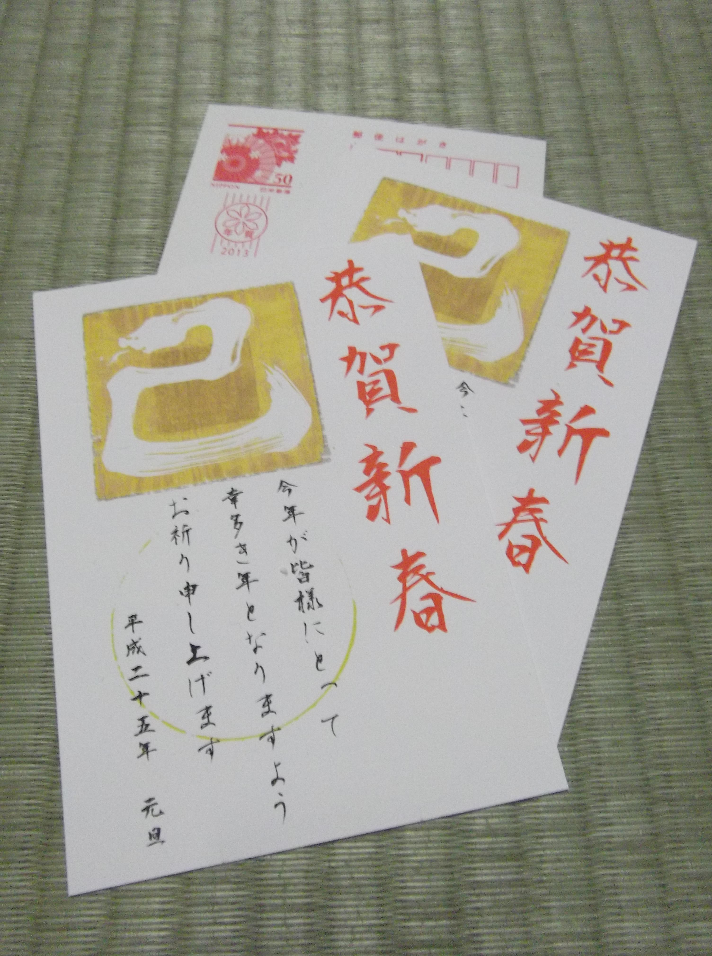 日本の年賀状の一例。 蛇の絵の著作権はindividual locker が所有。著作物の改変などの許可はこのページにあり。 字体は完全なるフリーフォントである、青柳衡山・疎石フォントを使用。